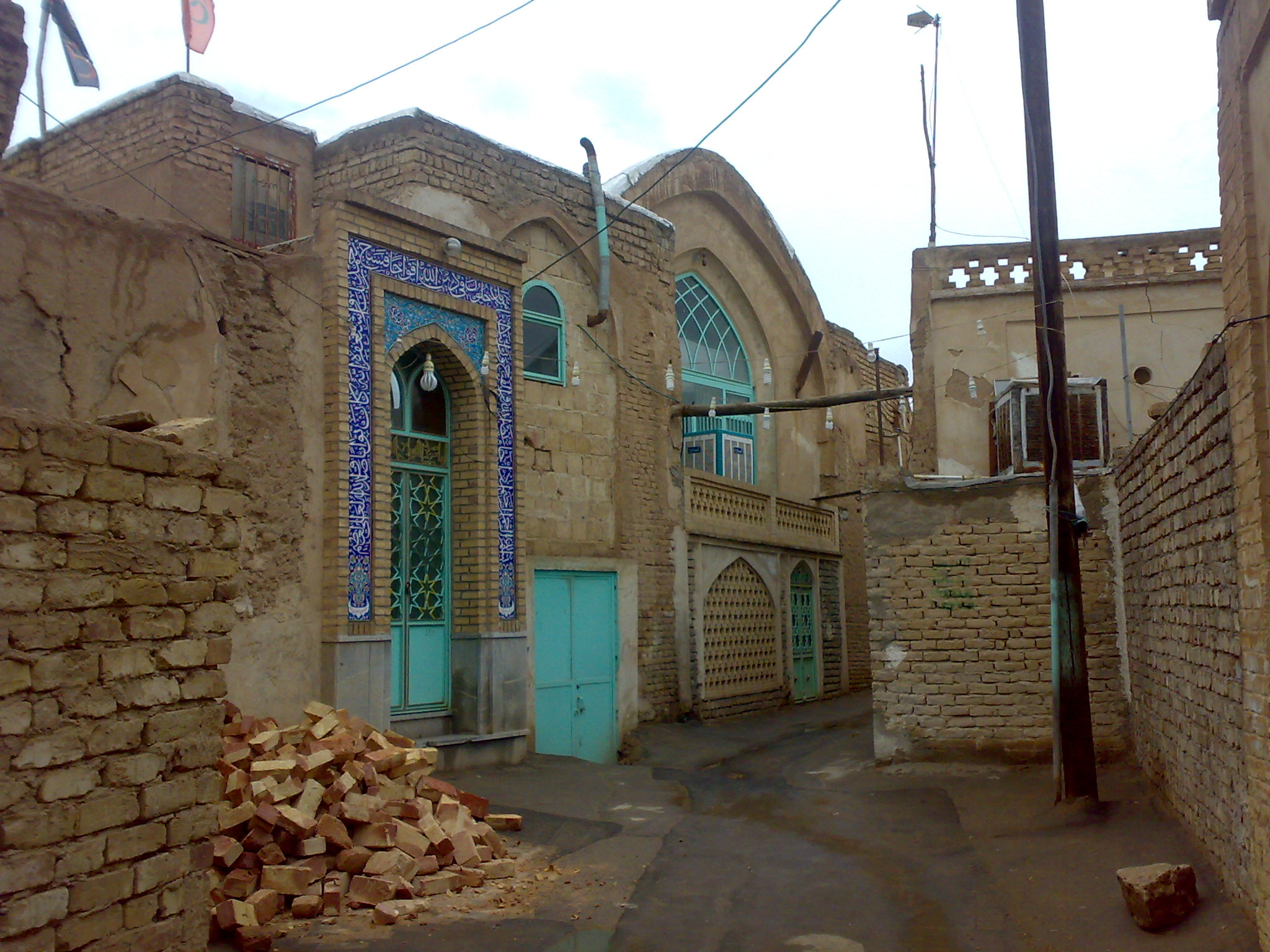 آران وبیدگل مسجد و آرامگاه آیت اله شهید قاضی ملاعلی آرانی